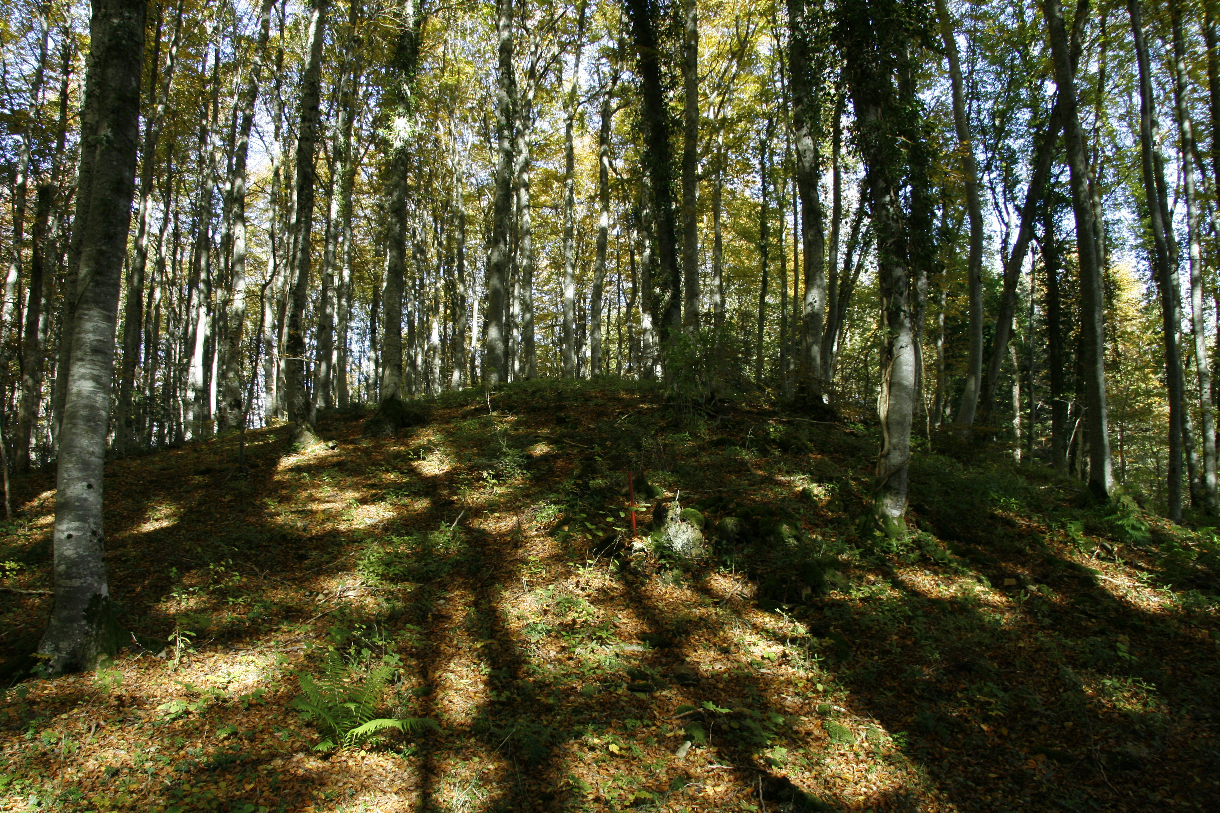 Sommet du Trè Pellay; Aranc; Ain; France